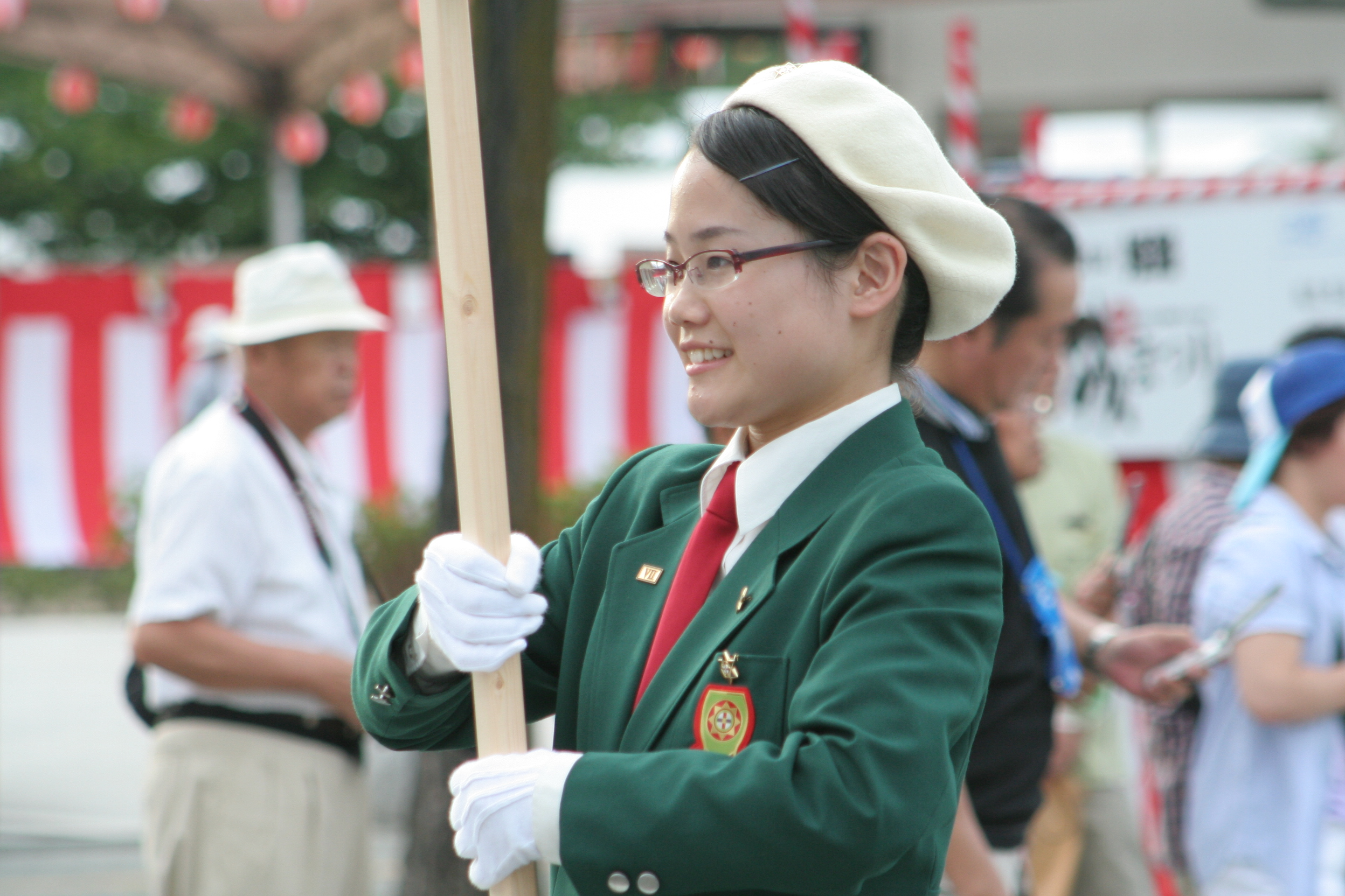 姫路お城祭り。2010年8月6日から9日の3日間に兵庫県姫路市にて開催された姫路の祭り。2日目の大手前公園および大手前通りでのパレードの模様。